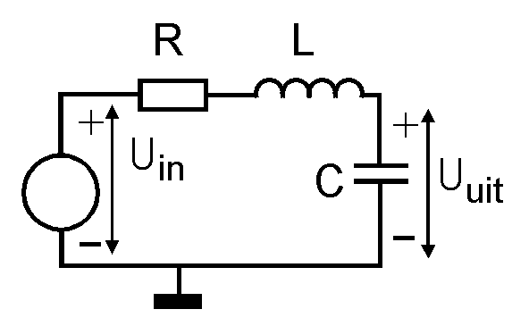 aangestuurde seriekriing (LCR)